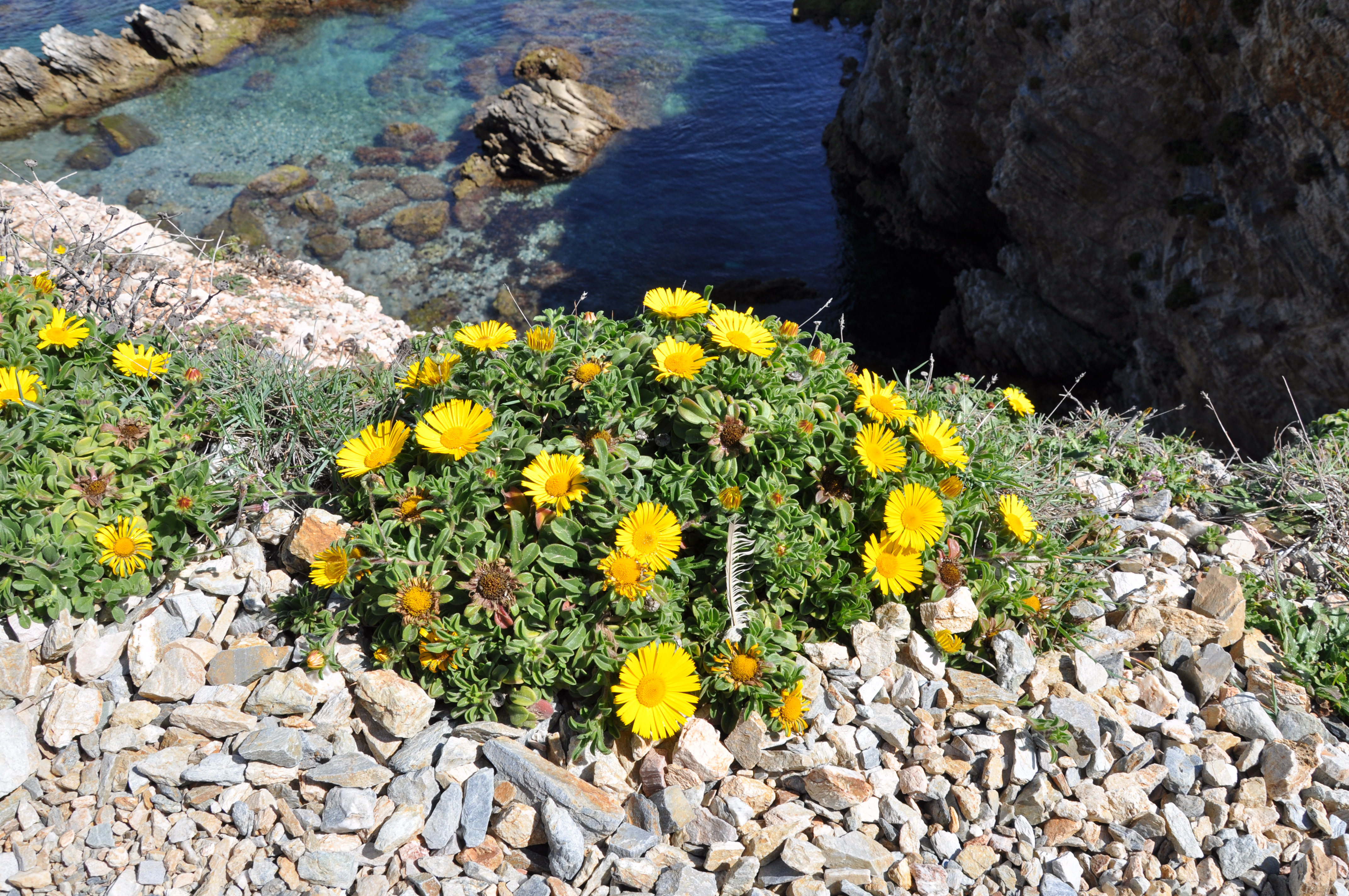 Margarita de mar (Pallenis maritima) Ceuta, España.